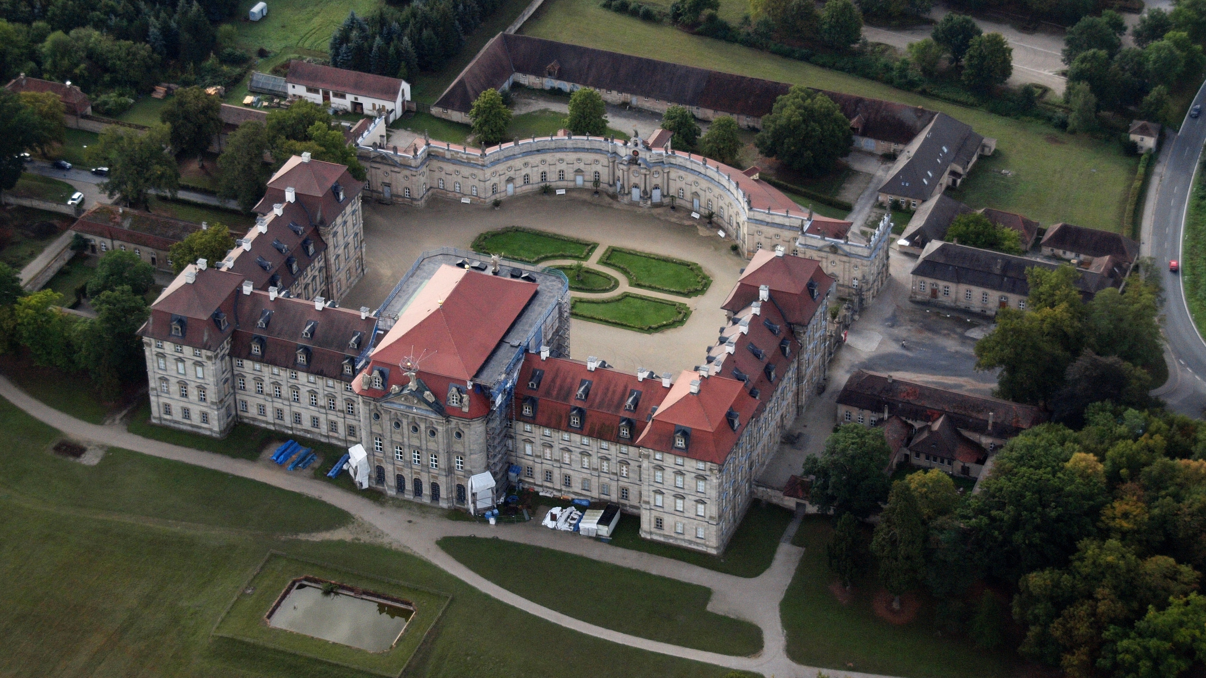 Schloss Weißenstein (Pommersfelden), Nord-West-Ansicht, Luftaufnahme (2015)